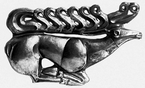 бляшка у формі оленя.